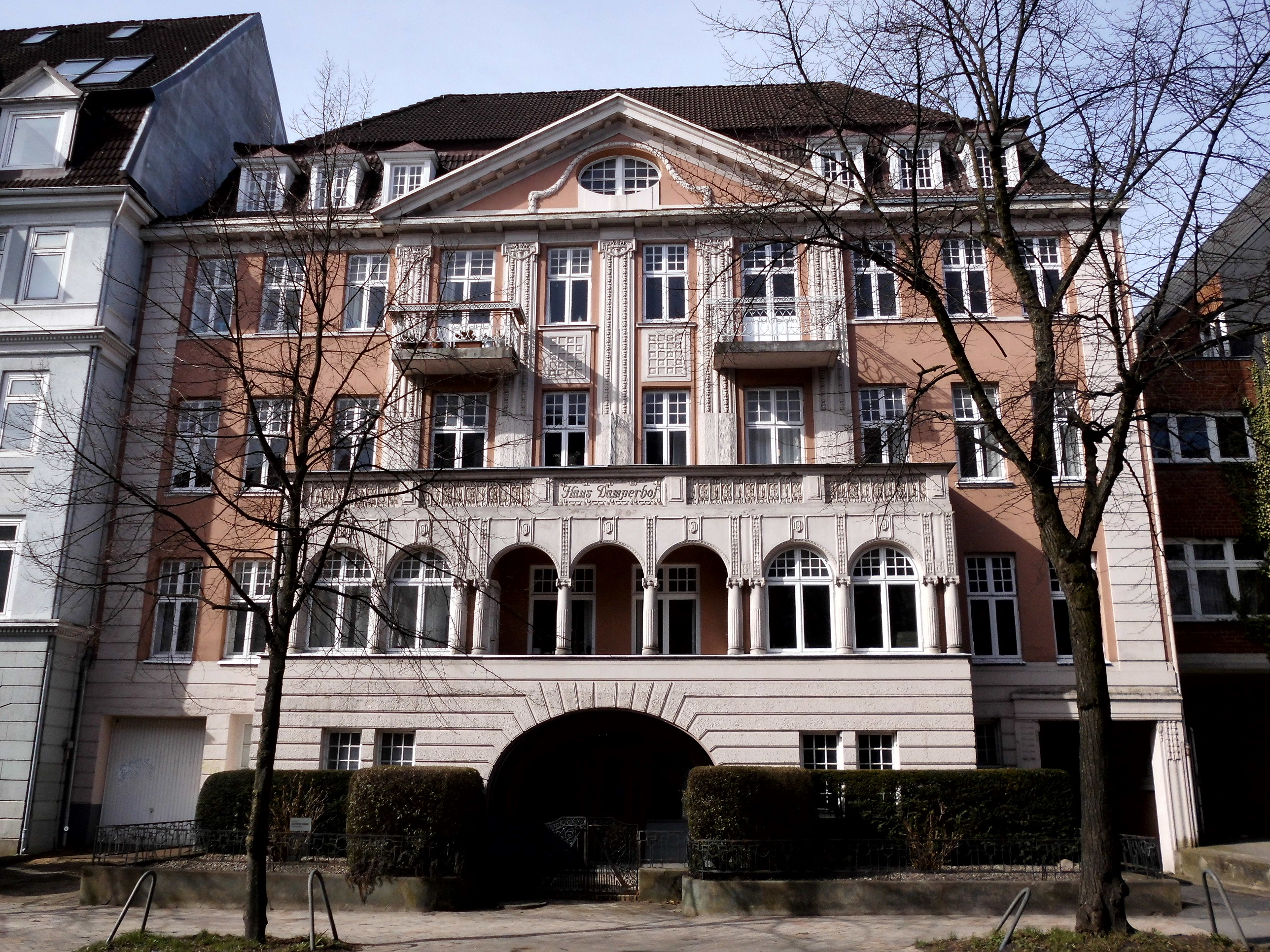 Knooper Weg 51 im Kieler Stadtteil Exerzierplatz.